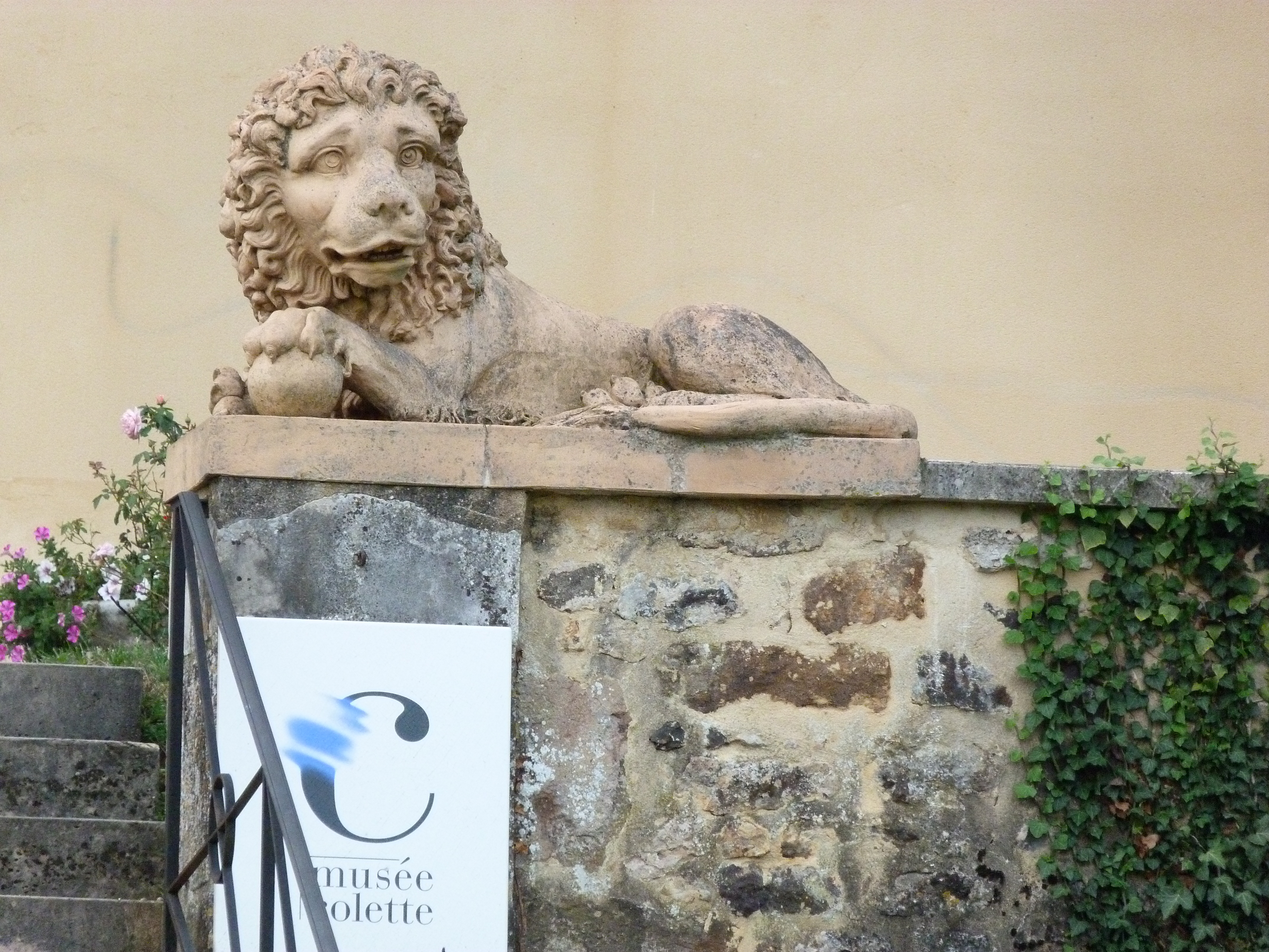 Musée Colette